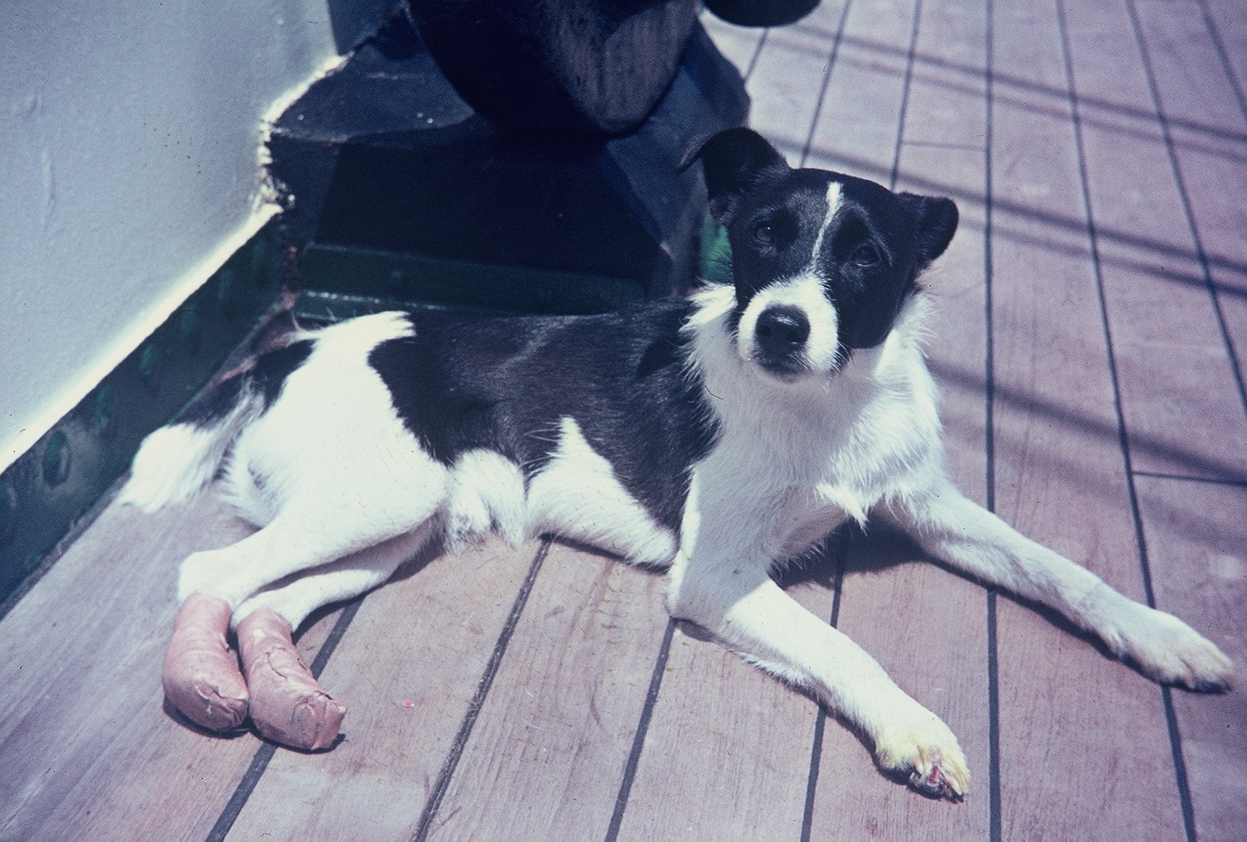 Bordhund des Segelschulschiffs Gorch Fock (1958) mit verbundenen Hinterpfoten nach Säureverletzung